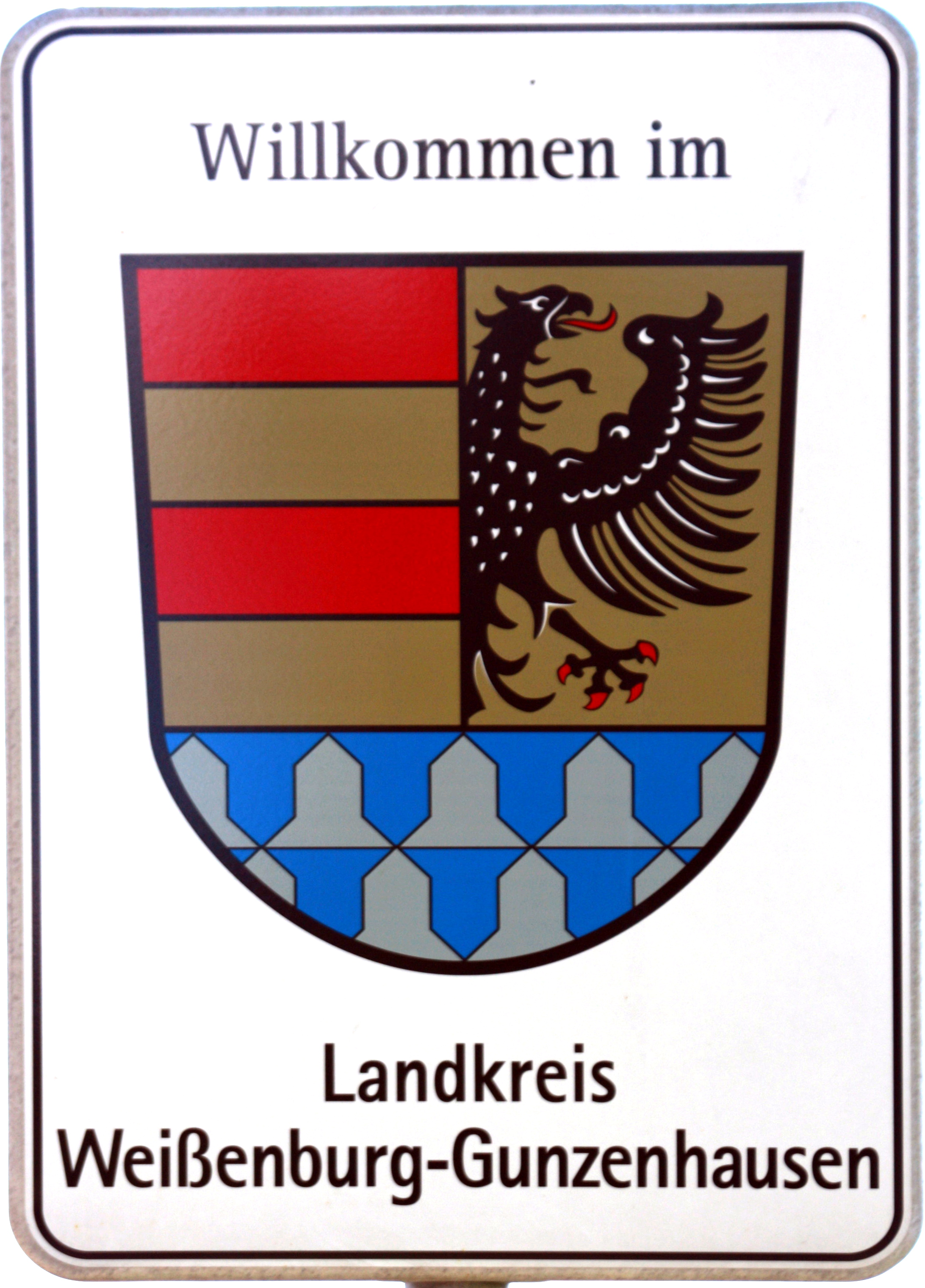 Landkreisschild mit dem Wappen des Landkreises Weißenburg-Gunzenhausen